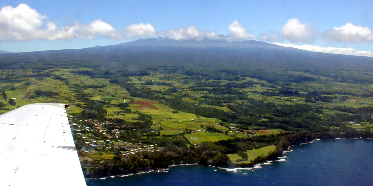 Иллюстрация для викиучебника Гавайеведение